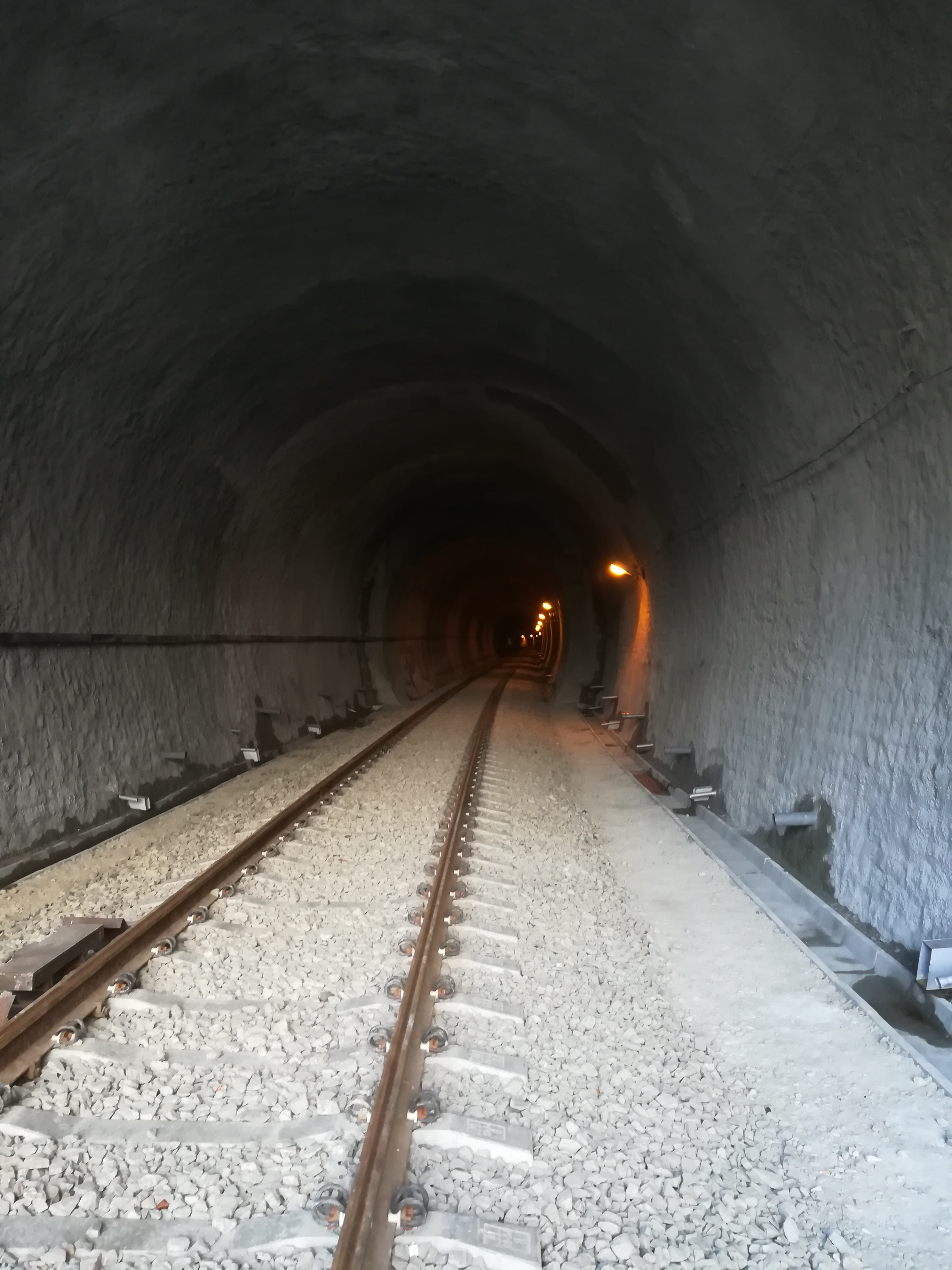 Tunel kolejowy w Łupkowie na granicy PL/SK na linii kolejowej nr 107 po remoncie.